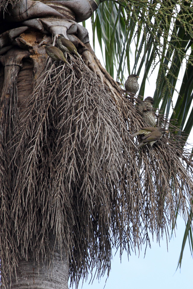 Sierra Baerucu National Park & Lago Er.